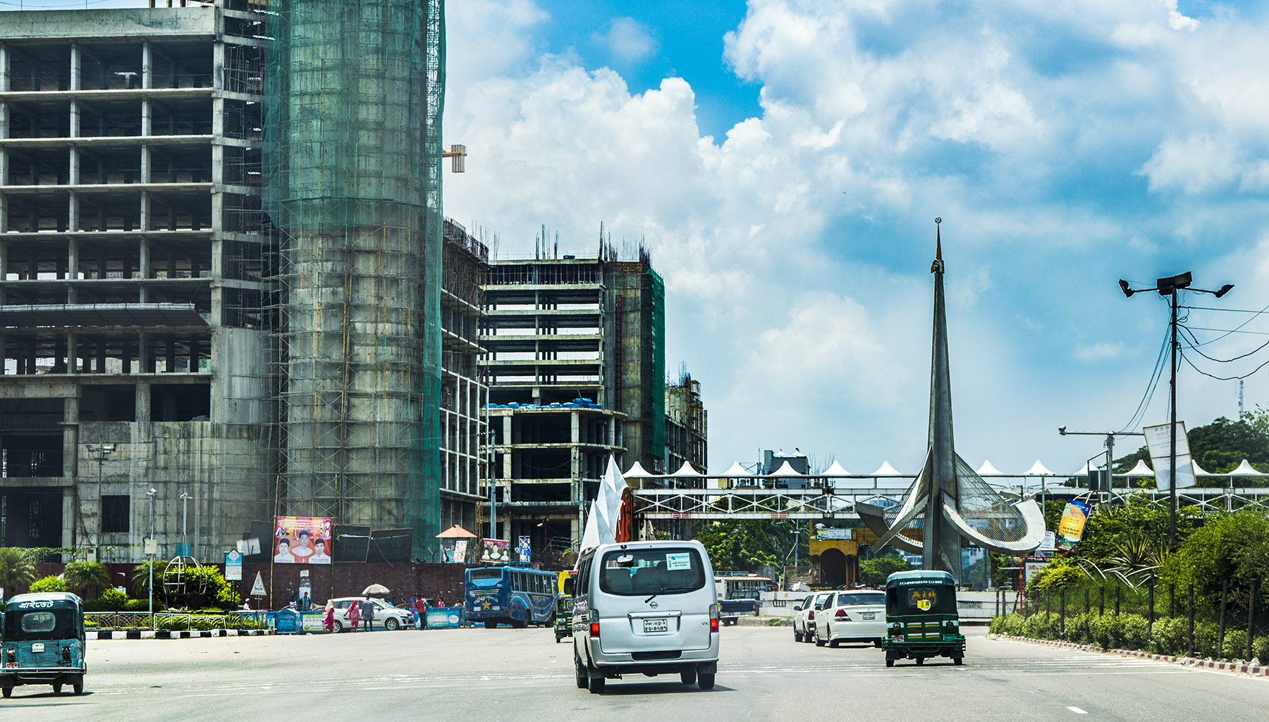 Dhaka